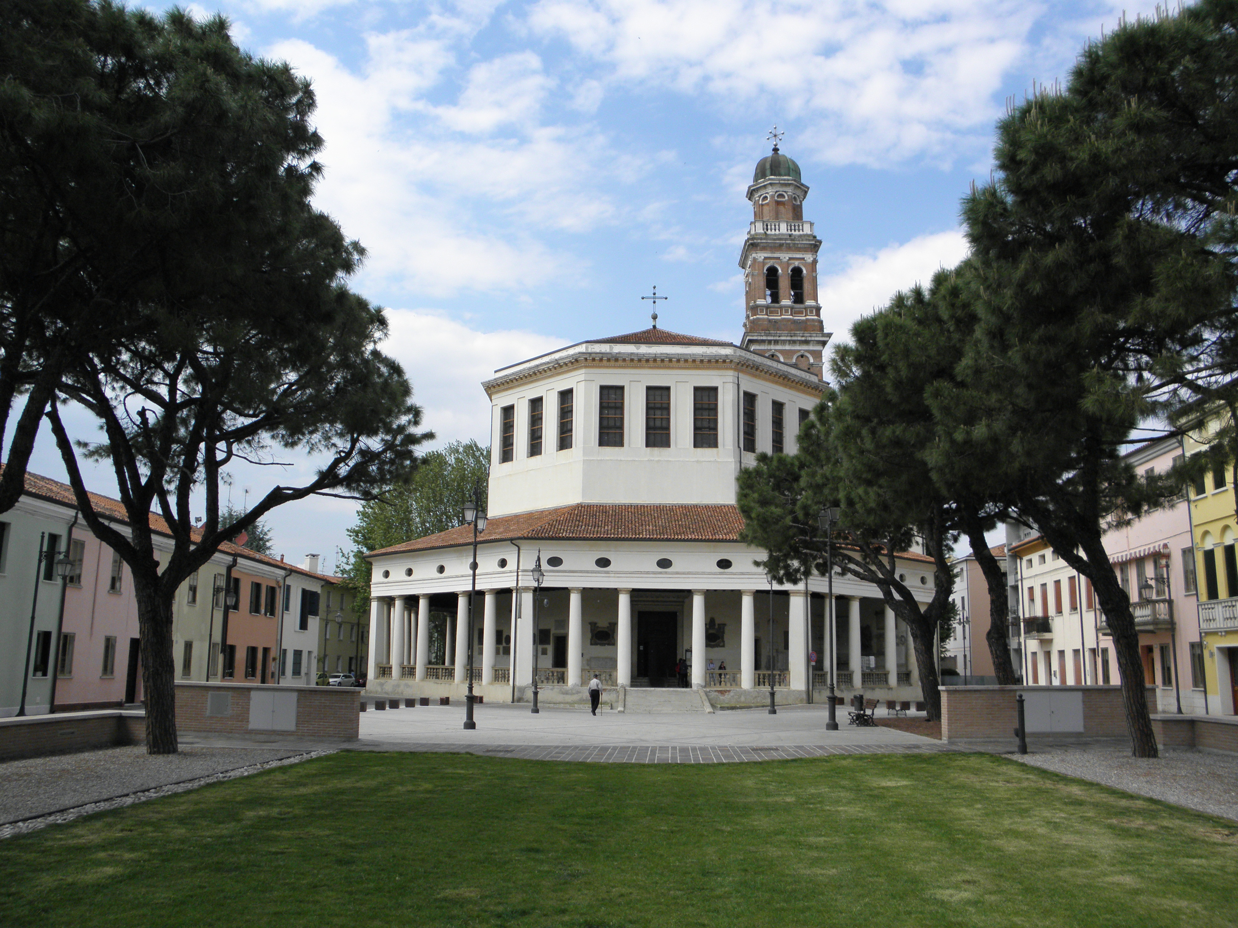 Rovigo, Chiesa della Beata Vergine del Soccorso detta "La Rotonda": vista dalla rinnovata Piazza XX Settembre.